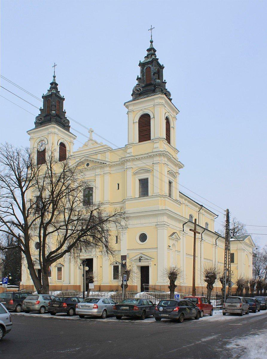 Kościół pw. Przemienienia Pańskiego w Garwolinie.